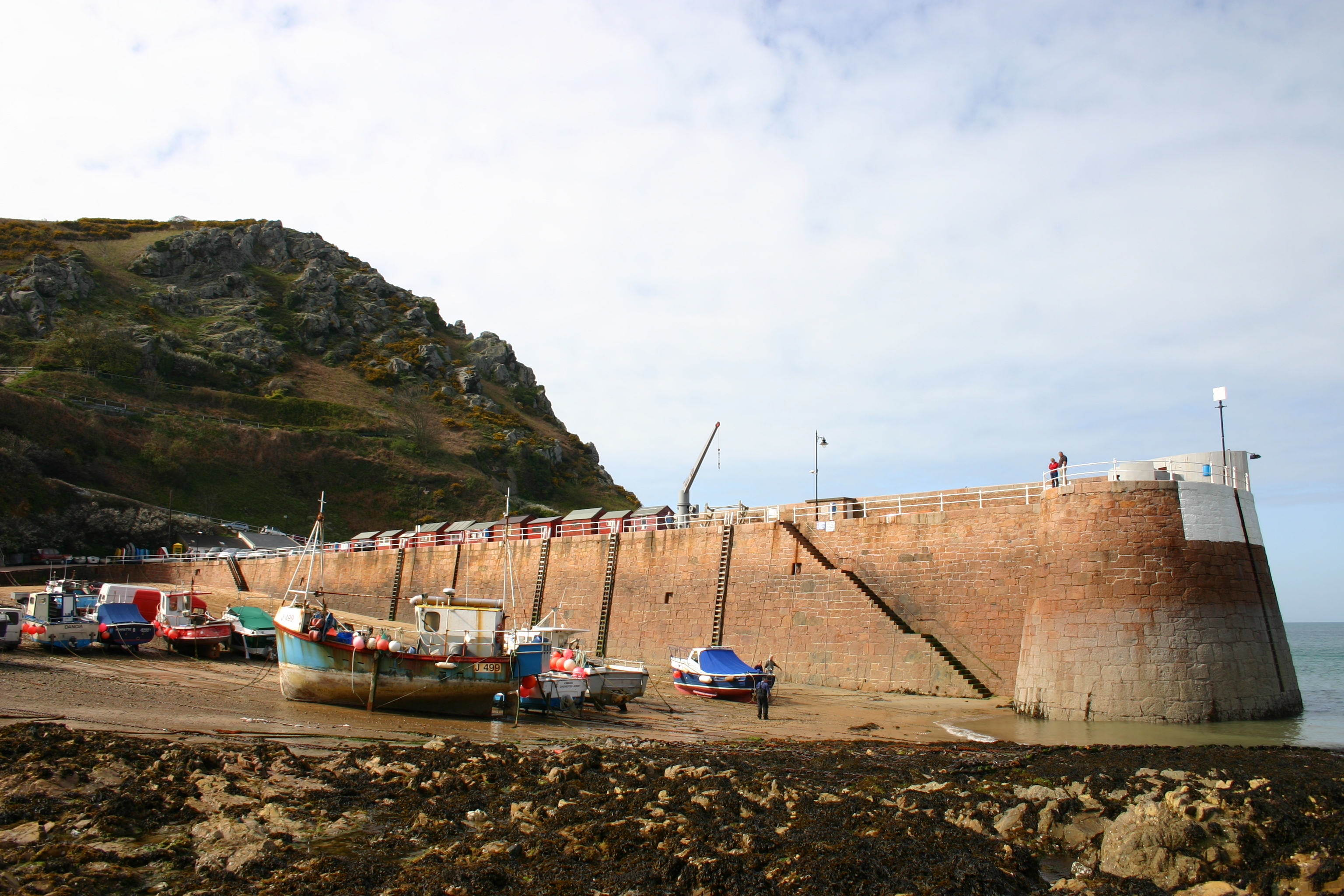 le môle de Bouley Bay sur la côte nord de Jersey dans la paroisse de la Trinité